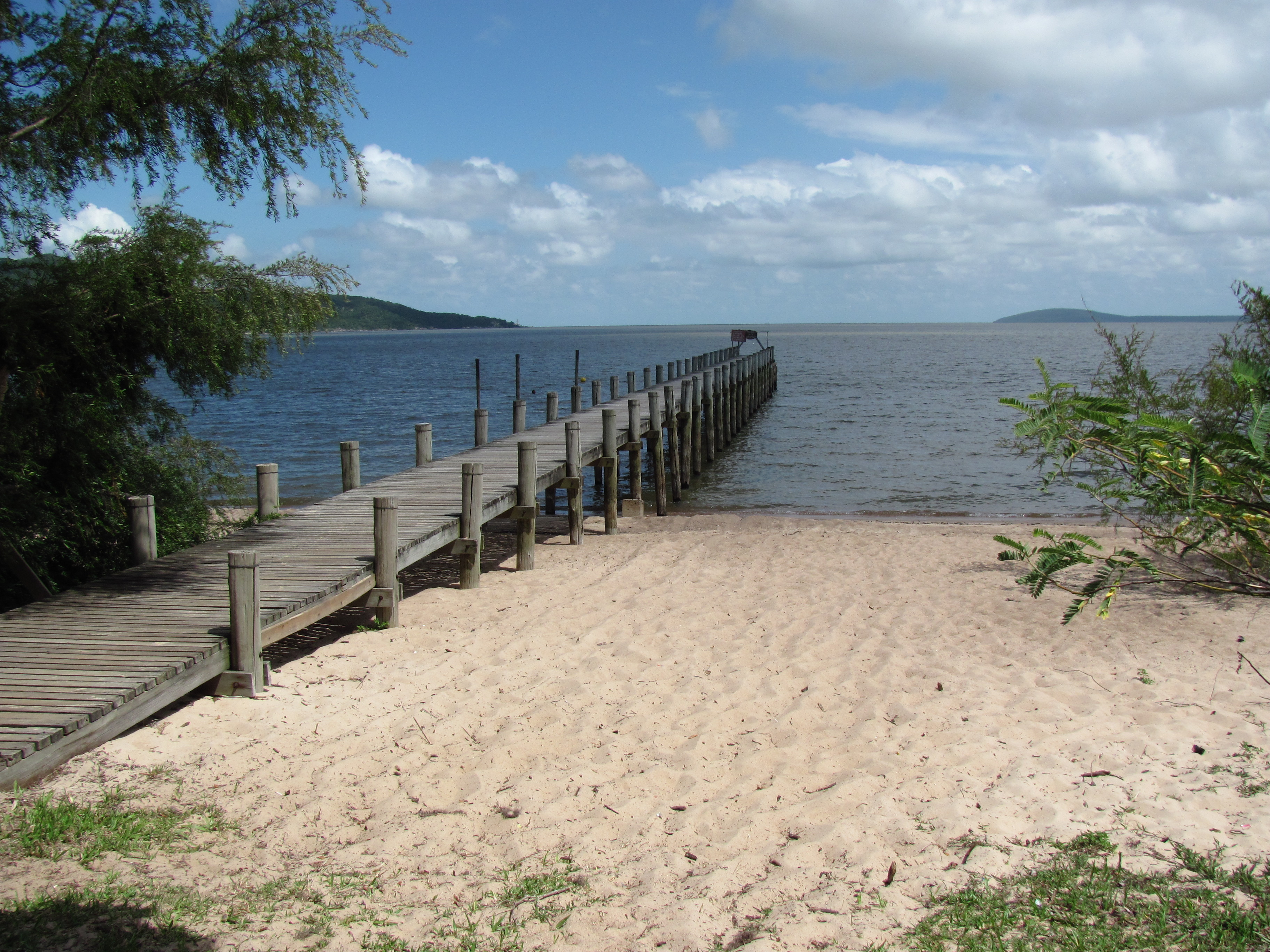 Cais Praia das Pedras